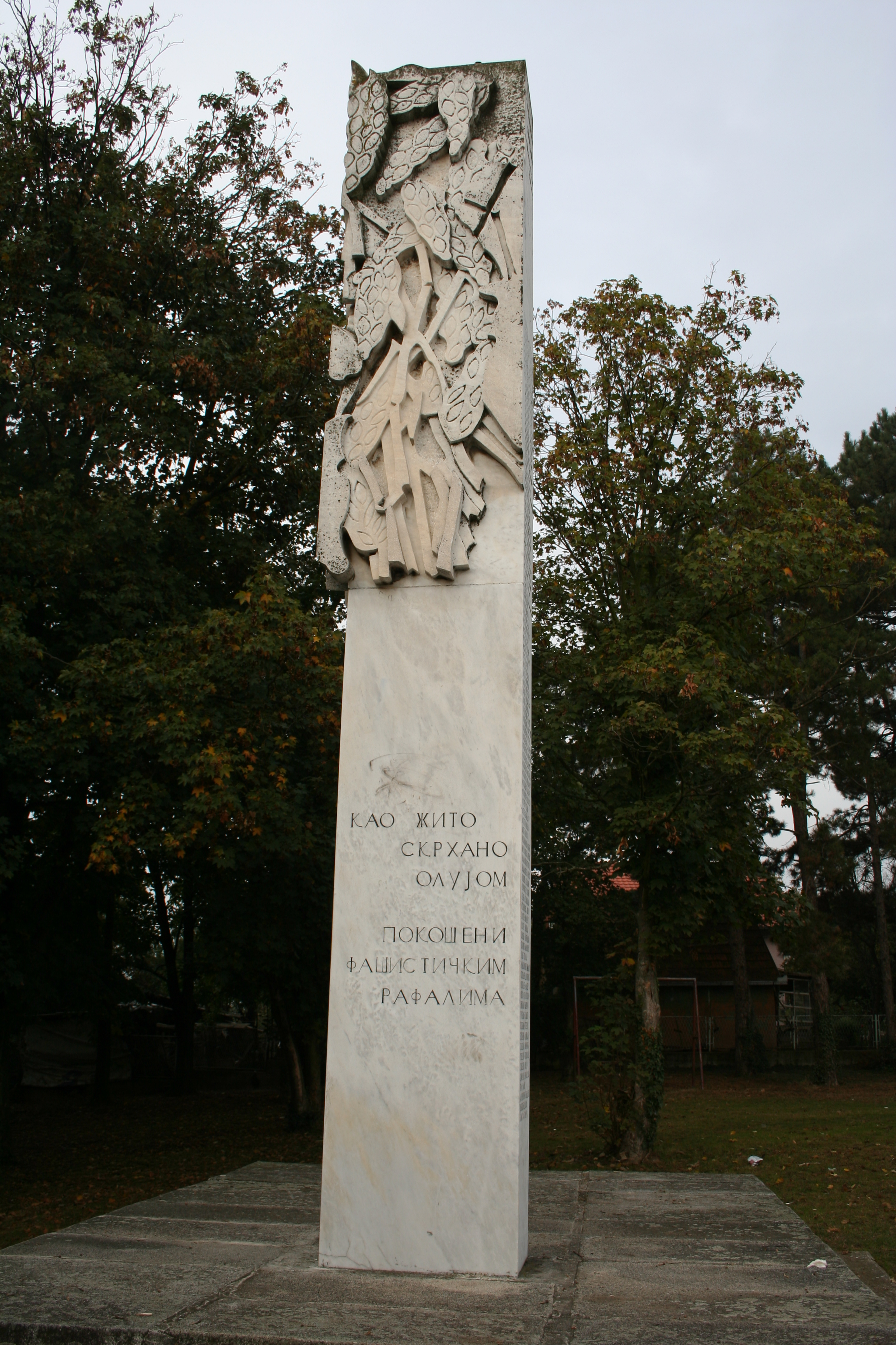 Spomenik streljanim stanovnicima Grabovca 1941. godine